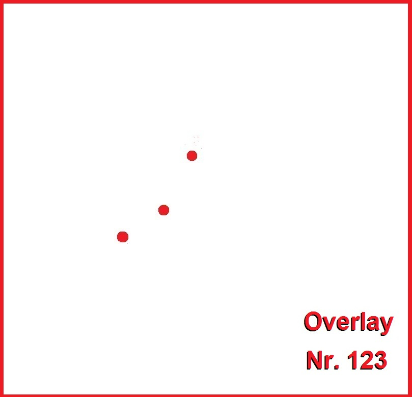 Stark vereinfachte Darstellung einer Overlay-Folie für Radar-Navigation